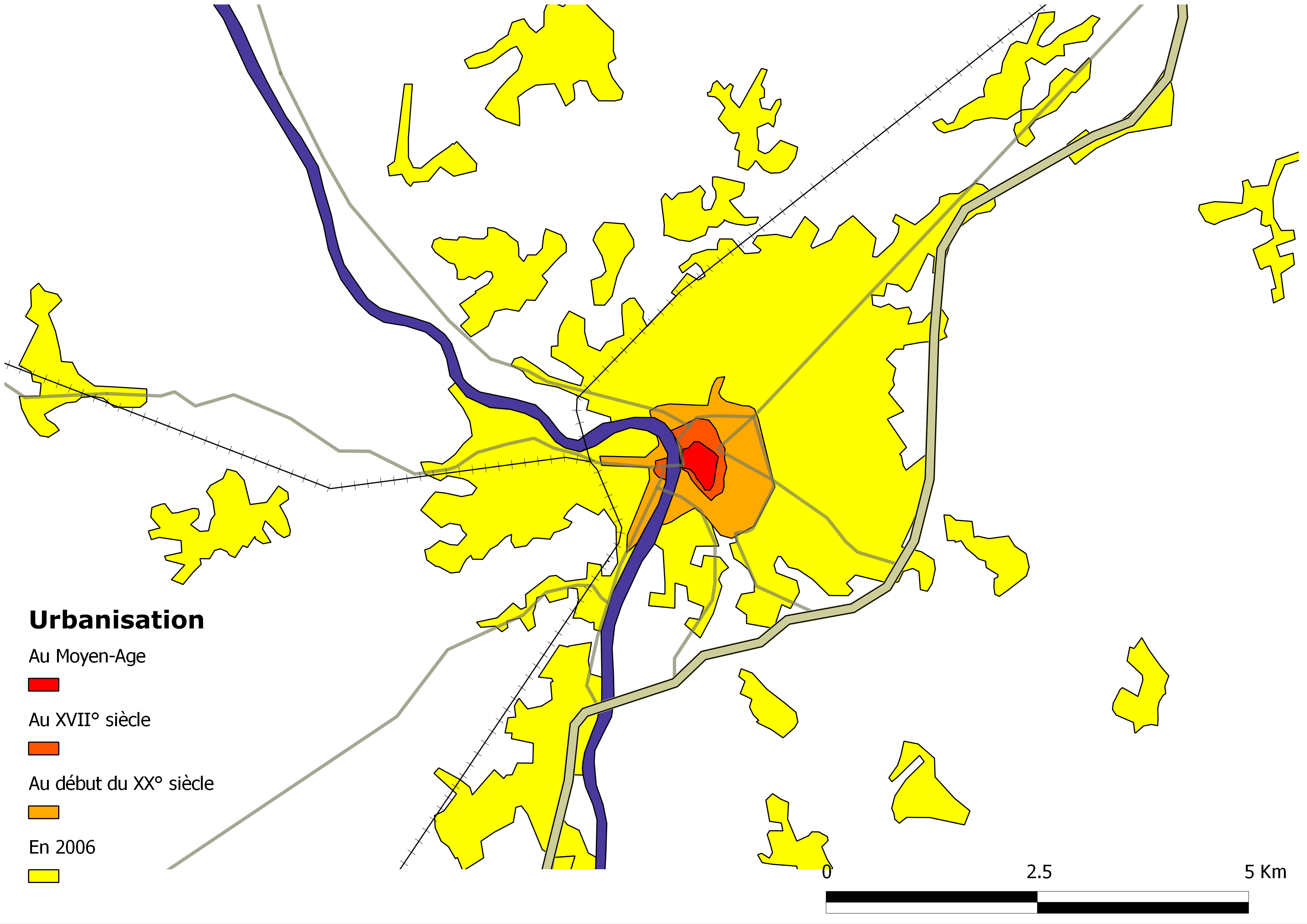 Urbanisation de Montauban su Moyen Age à aujourd'hui. Sources : IGN-Scan25, Corine Land Cover, Carte d'Etat Major, Plan du Commandant Delaval (1904)